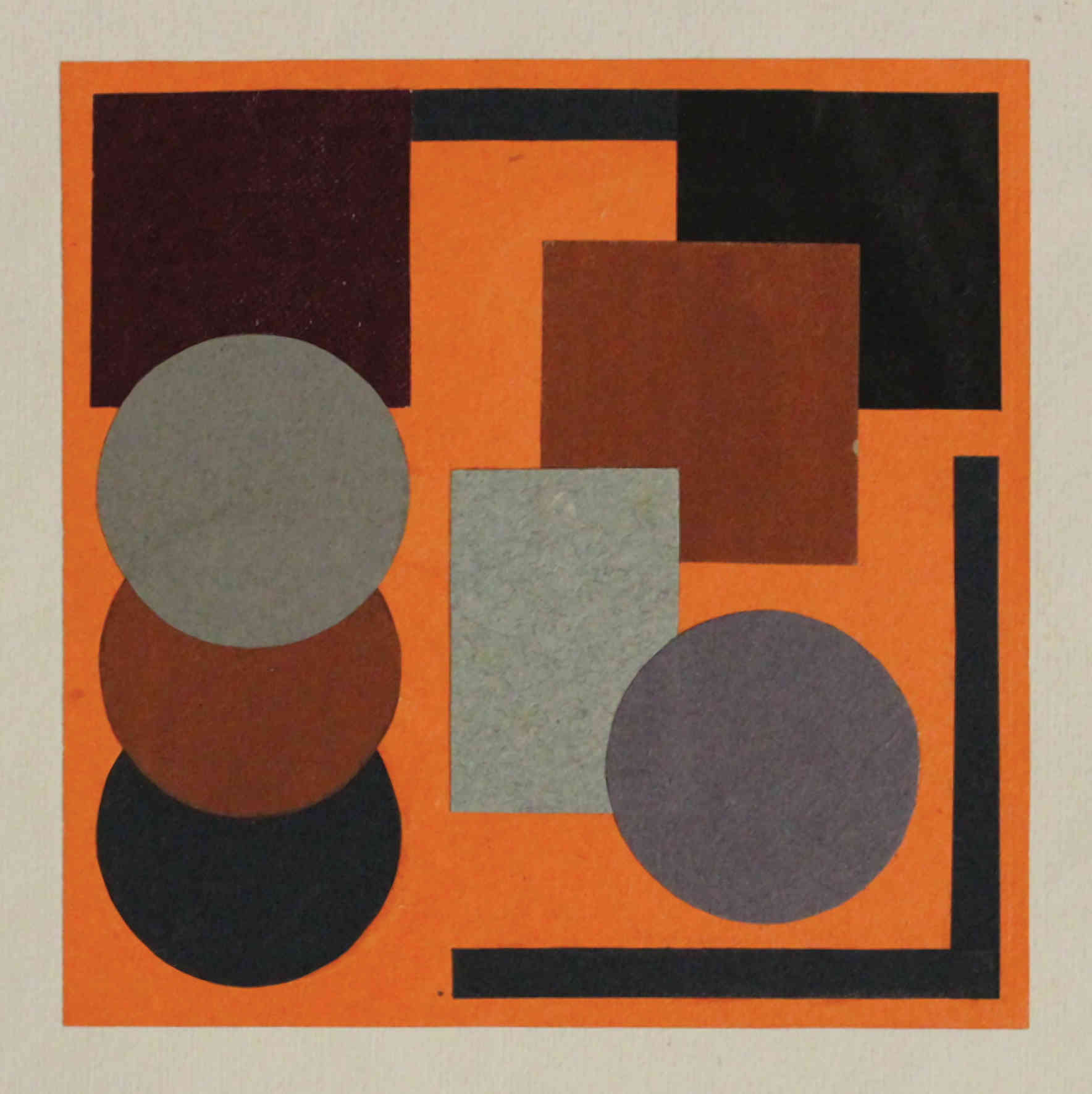 Супрэматычная кампазіцыя. Бумага, аплікацыя